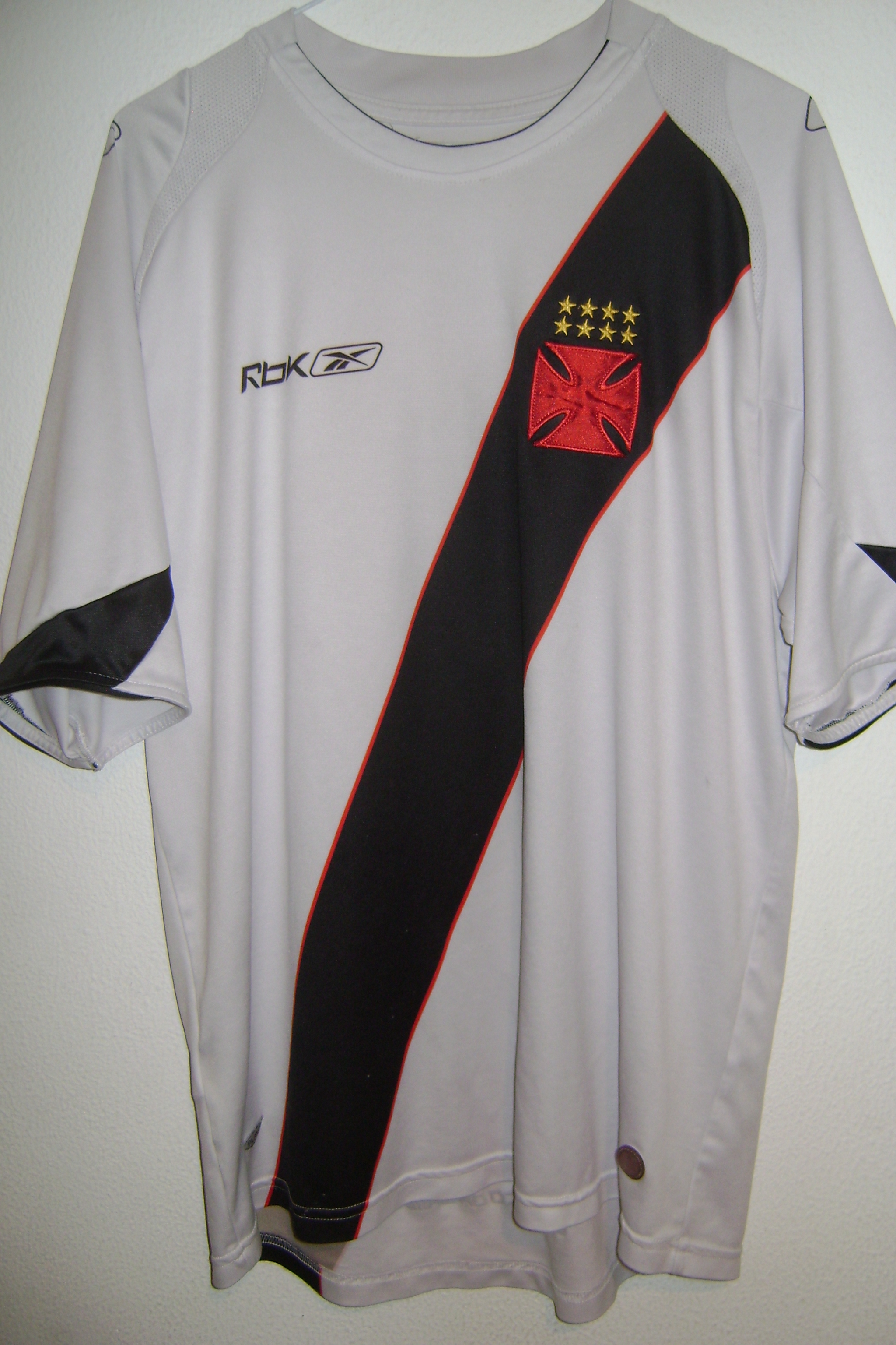 Camiseta del Vasco